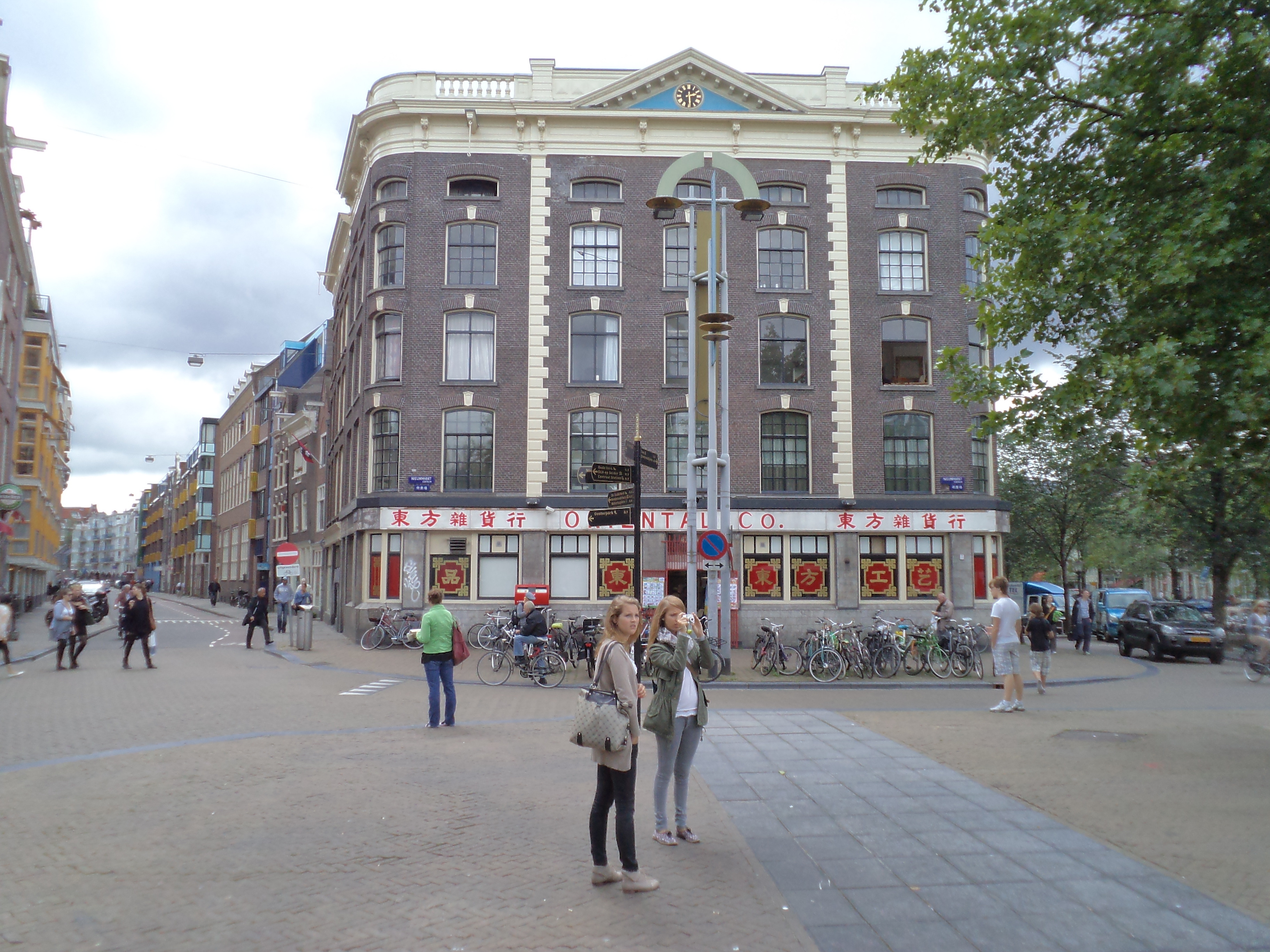 Pand met de klok, Sint Anthoniebreestraat 2, Nieuwmarkt Amsterdam